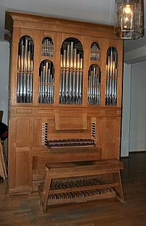 Die Orgel im kleinen Orgelsaal von Johannes Rohlf (15 Register, II/P, 1986)